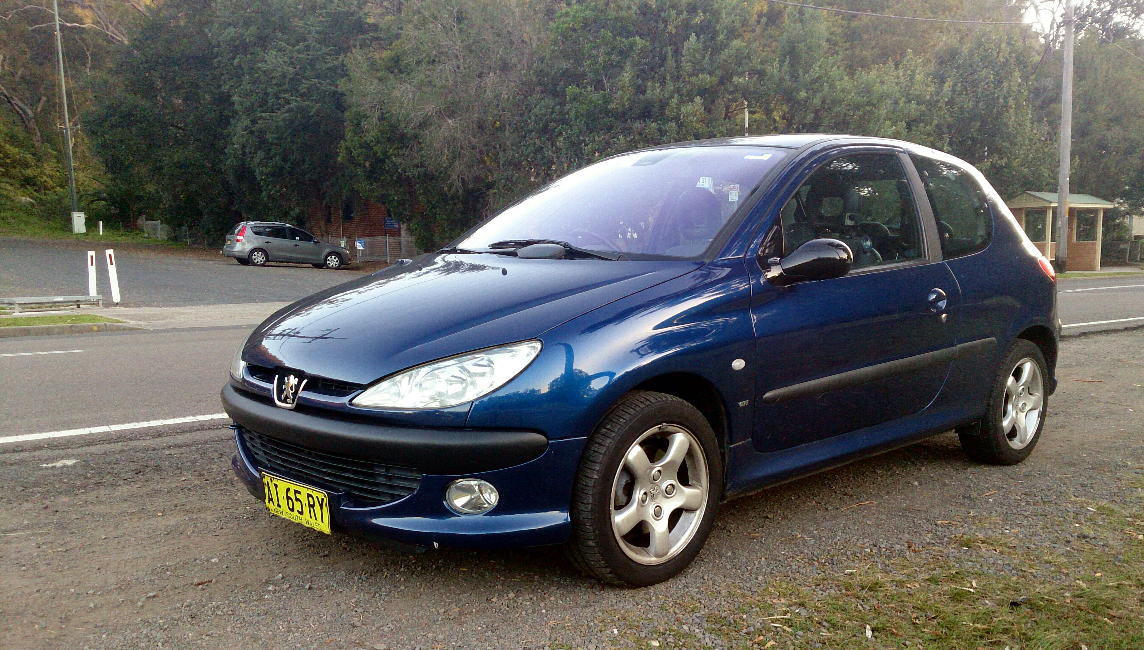 Peugeot 206 GTi